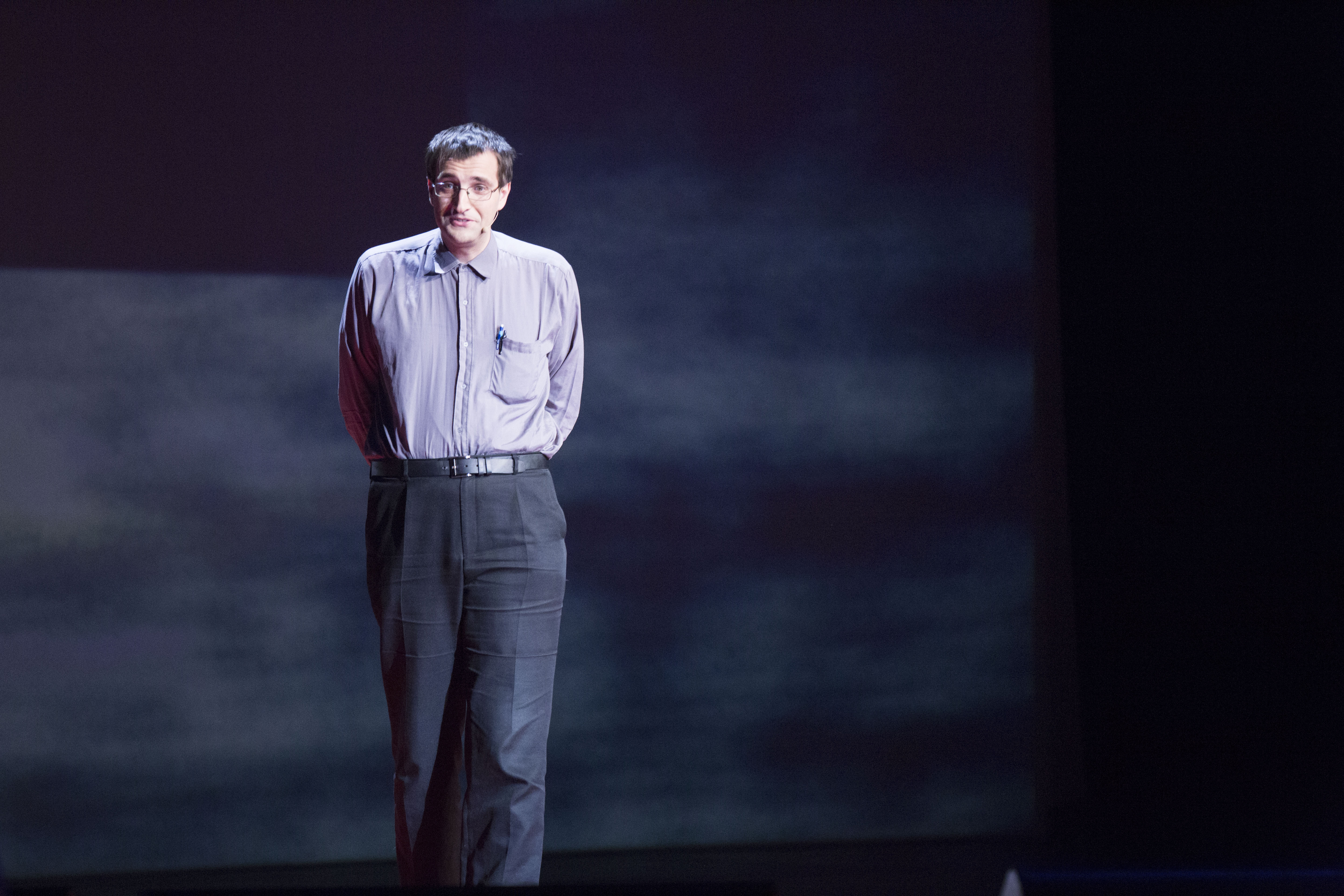 Témoins du mondes - Josef Schovanec - (CC) Olivier EZRATTY